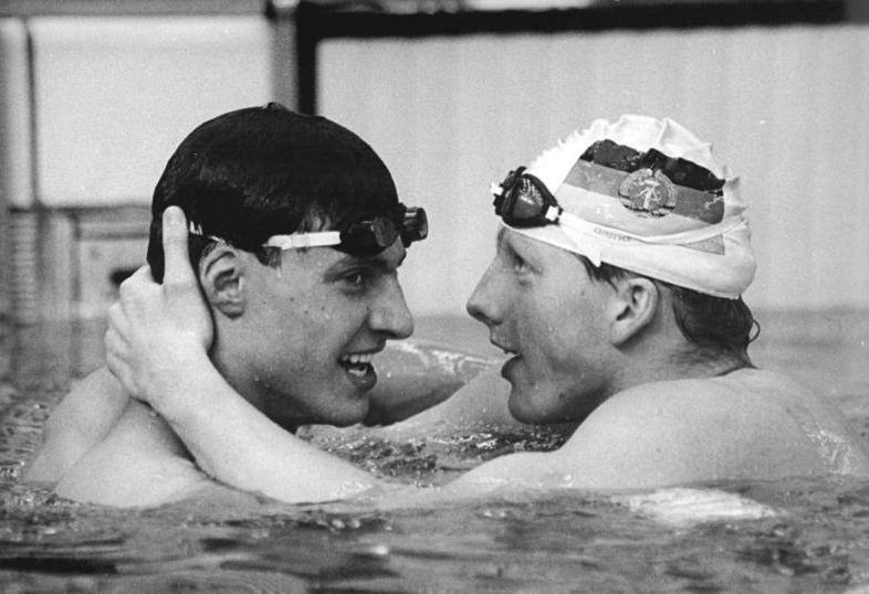 Sven Lodziewski, Rainer Sternal ADN-ZB Kasper 16.6.87 Erfurt: 33. DDR-Meisterschaften im Sportschwimmen- Mit einer Jahresbestzeit von 1:49,27 min gewann Sven Lodziewski (SC Dynamo Berlin, l.) die 200 m Freistil. Mit dieser Zeit machte er auf dieser Strecke seinen fünften DDR-Meisterschaftserfolg in Serie perfekt. Herzliche Gratulation von Rainer Sternal (SC Magdeburg).